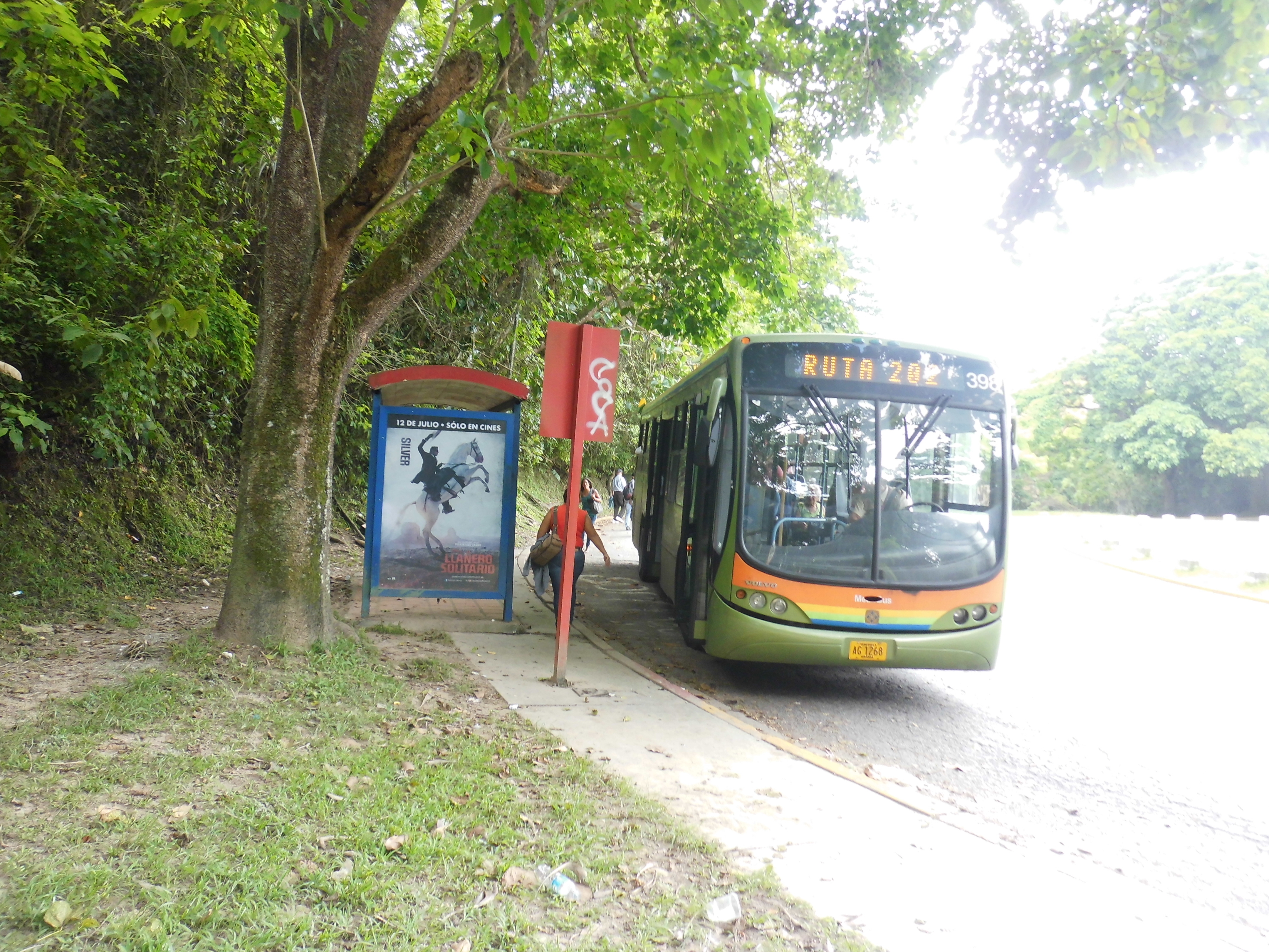 MetroBus parada La Lagunita, municipio Baruta, estado Miranda - Venezuela.